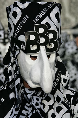 Basler Fasnacht 05